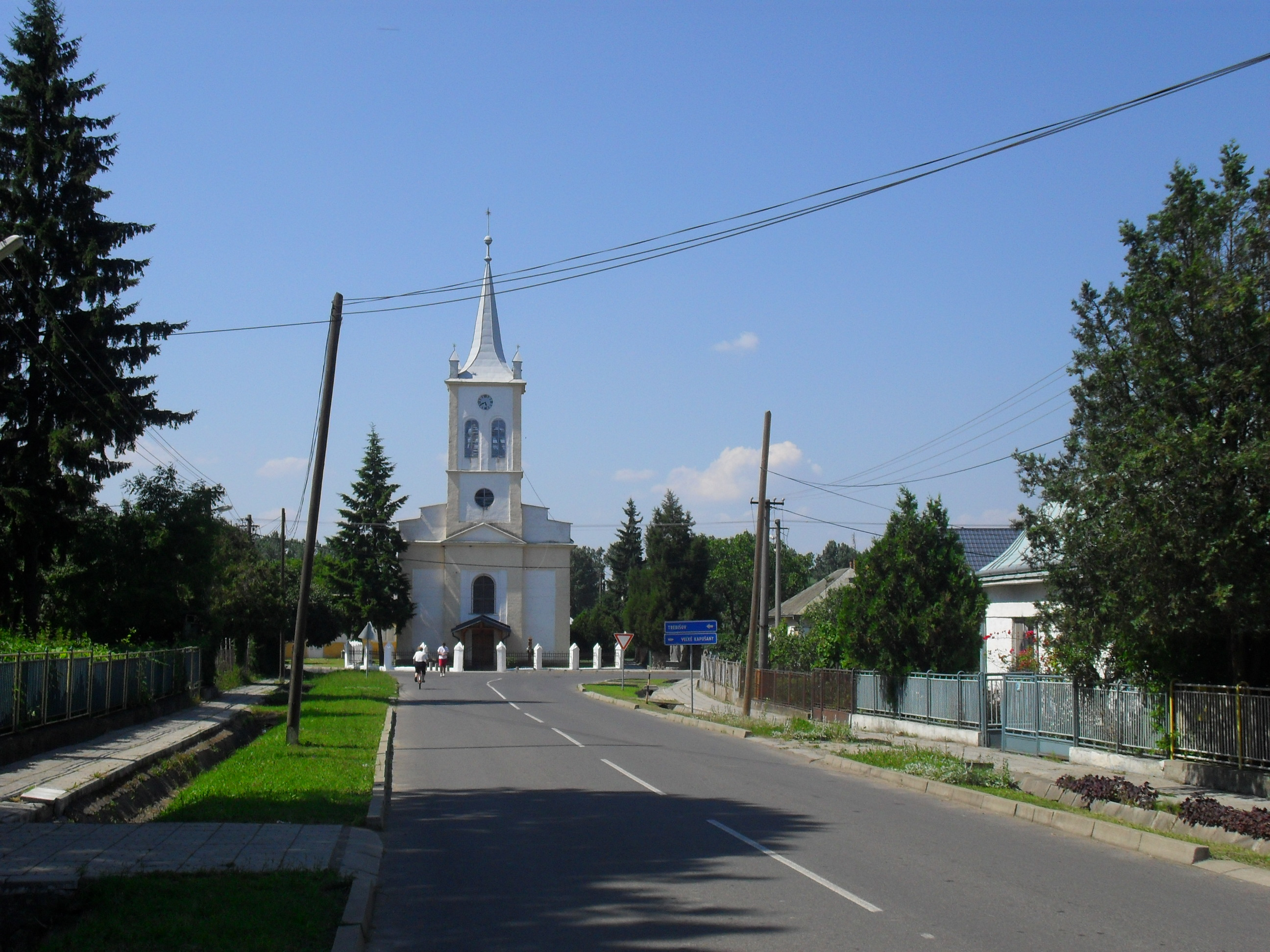 Vaján - utcakép a református templommal